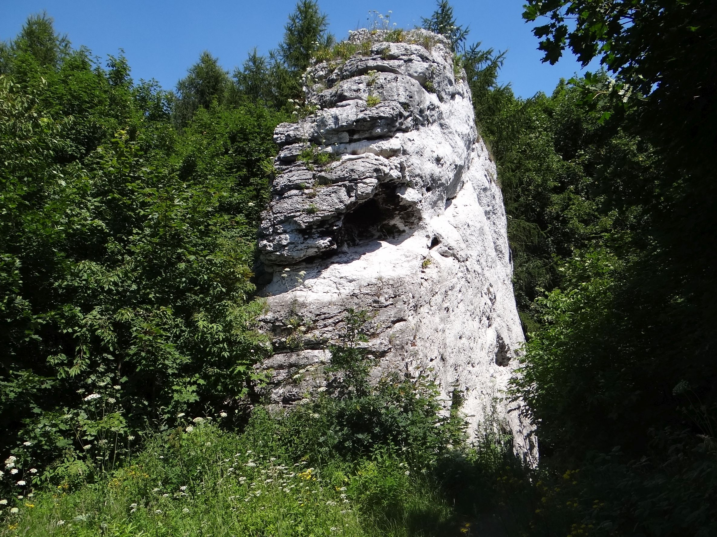 Skała Pierdolnik przy hotelu na Podzamczu